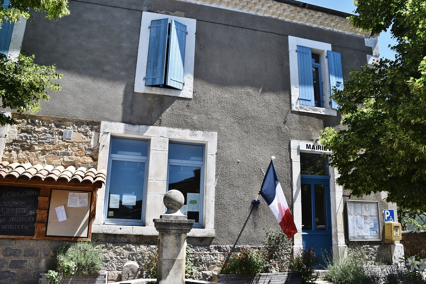 département de la Drôme